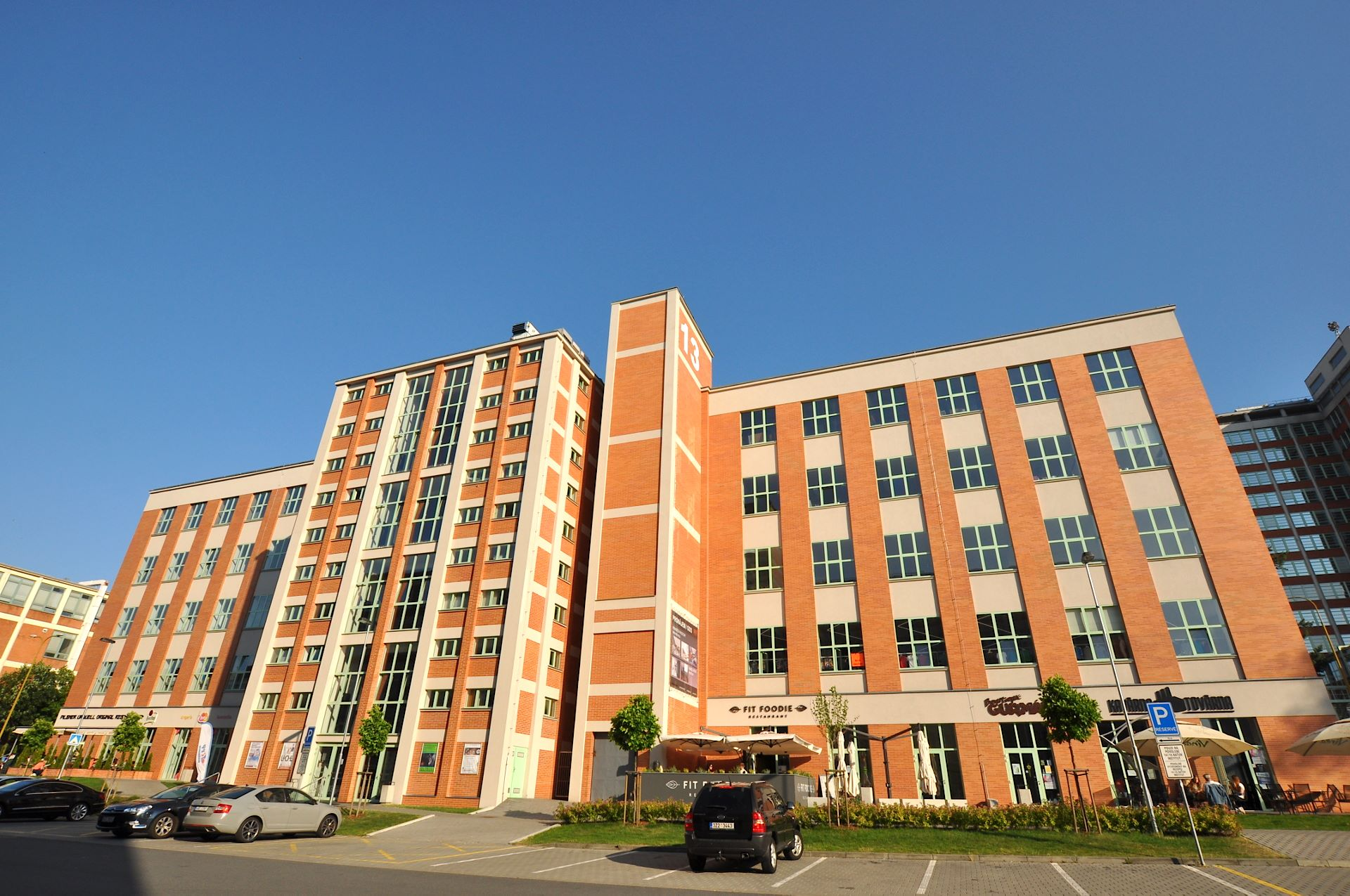 Zlín, Svit, budova 13, Vavrečkova 7074